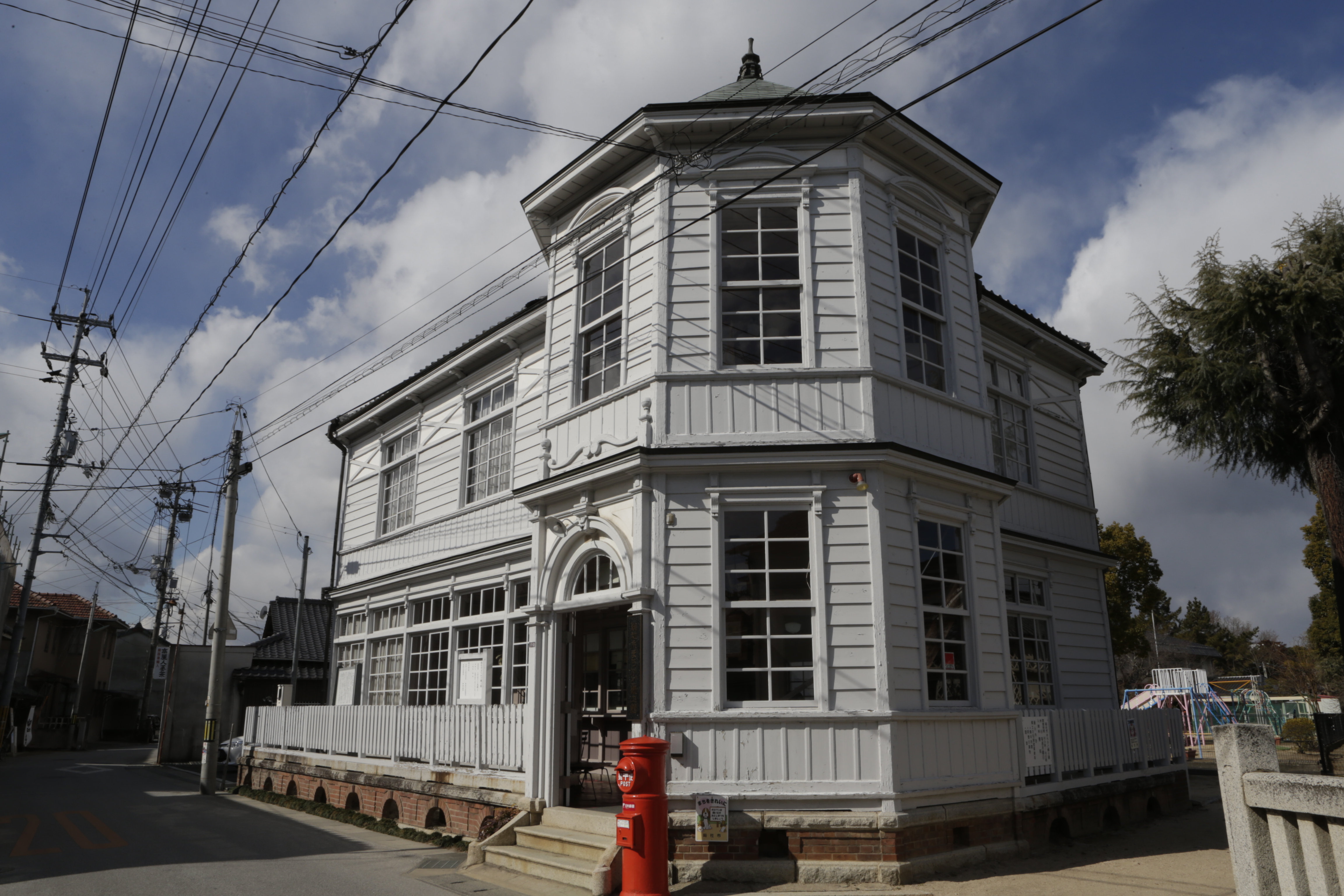 まちかど郷土館にて2018年2月6日に撮影